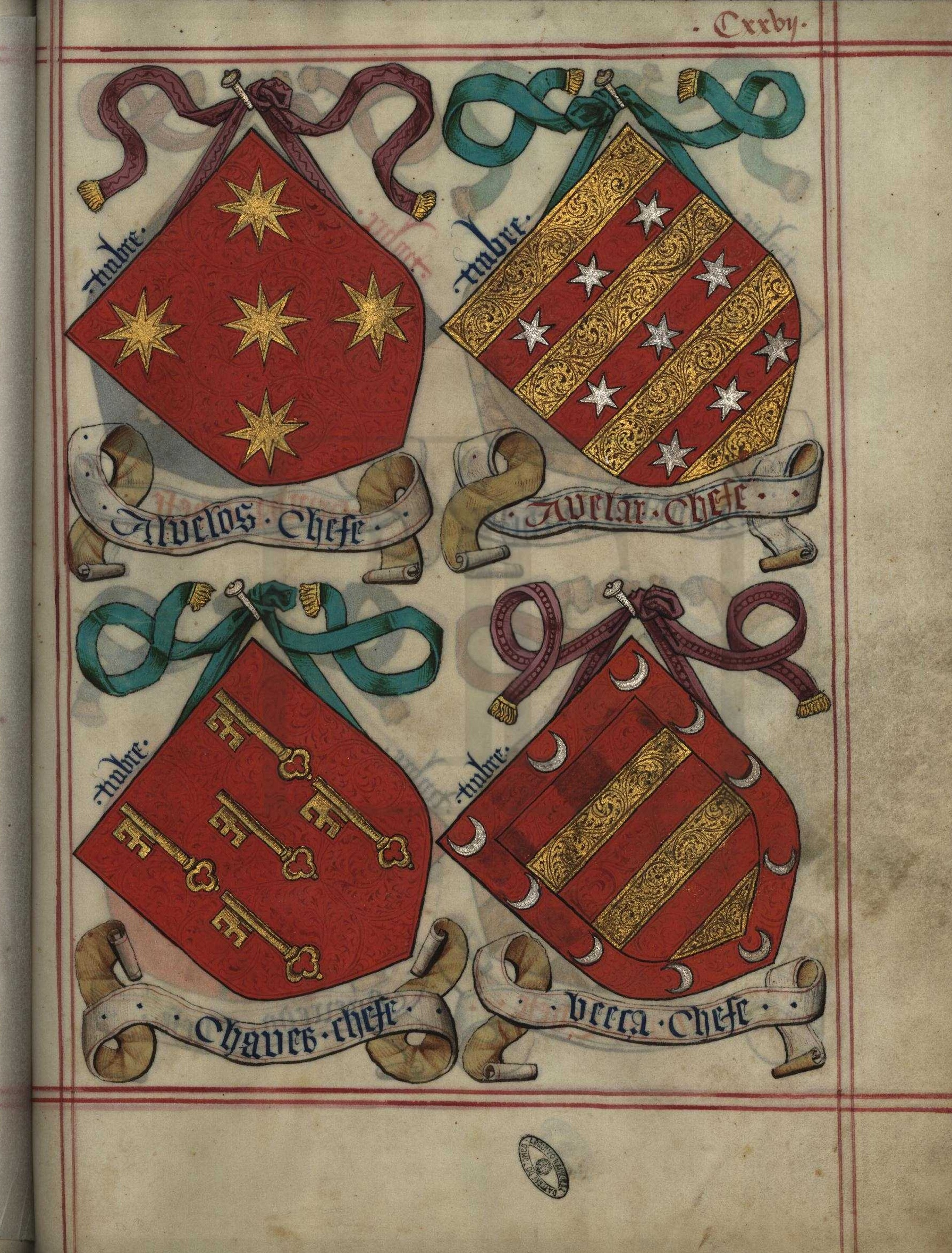 Livro do Armeiro-Mor (fl 127) - Alvelos, Avelar, Chaves, Beça